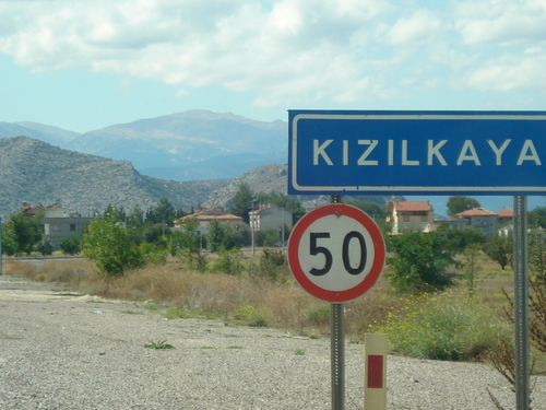 kızılkaya kasabası giriş tabelası